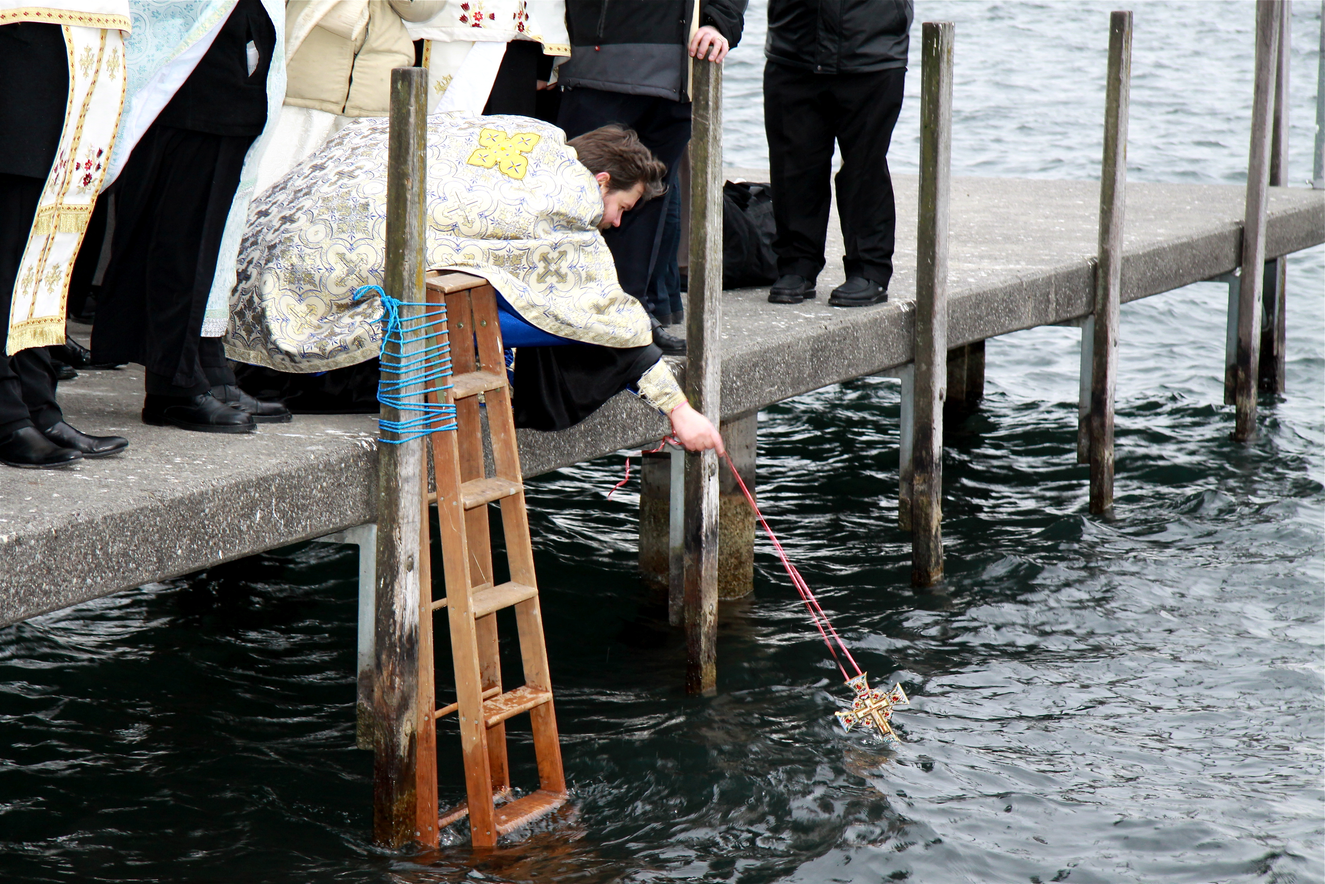 Die Grosse Wasserweihe wird von den orthodoxen Gläubigen jeweils am 19. Januar gefeiert. Mit der Grossen Wasserweihe wird durch das Wasser die gesamte Schöpfung gesegnet, deshalb gehört sie zu den drei wichtigsten Feiertagen im orthodoxen Kirchenjahr. Viele Gläubigen tauchen nach altem Brauch in das vom Priester gesegnete Wasser ein.